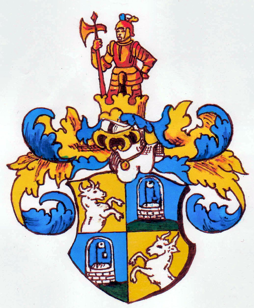 Die Familie Putz (Butz) von Rolsberg wird in den Reichsritterstand erhoben am 23.8.1694 durch Kaiser Leopold I., erneut bestätigt am 4.12.1706 durch Kaiser Josef I.